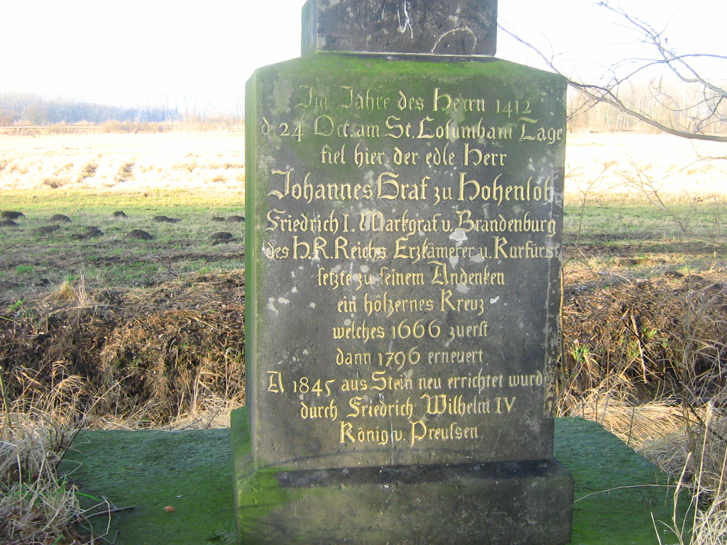 Steinkreuz am Kremmer Damm